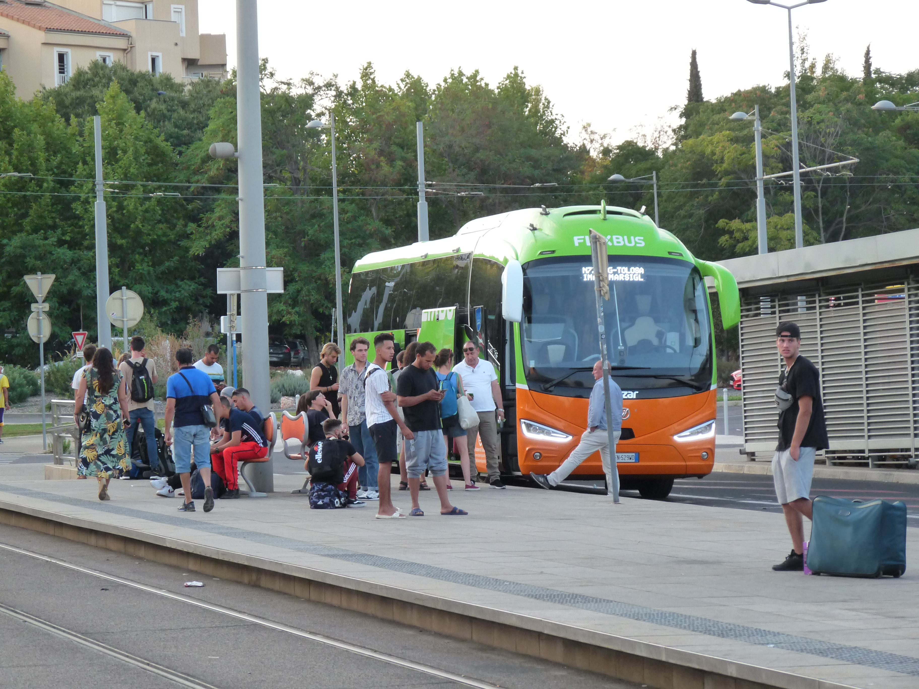 Flixbus die in de buitenwijken van Montpellier stopt. Tramhalte Sabinne